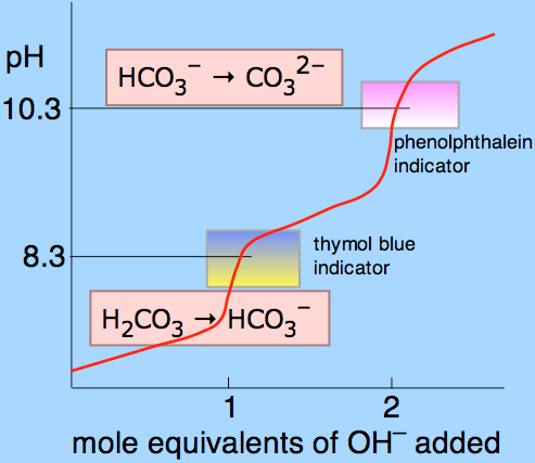 Titration curve for carbonic acid